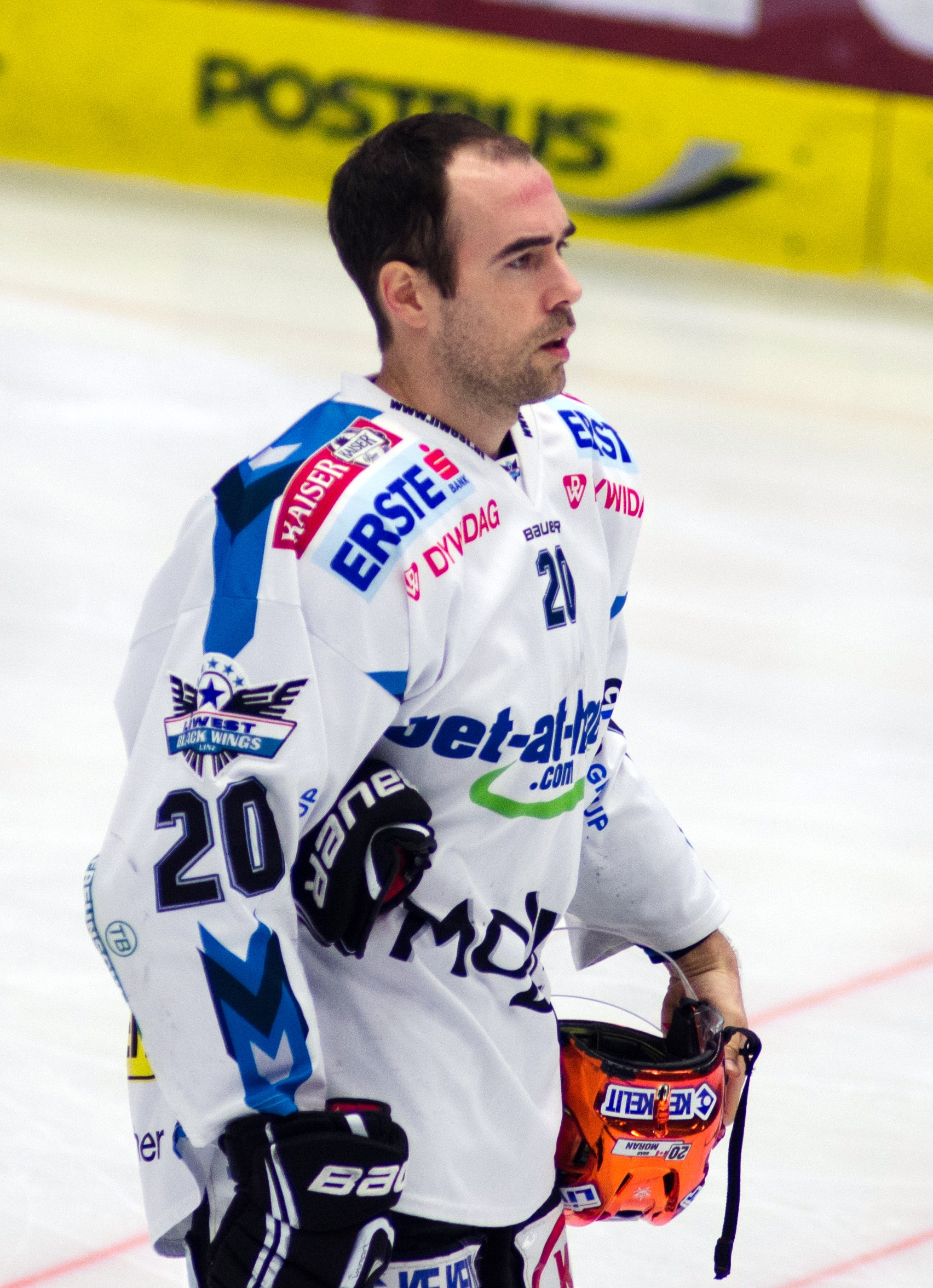 24.11.2013,Stadthalle Villach, AUT, EBEL, 40. Runde, EC VSV vs. EHC Liwest Black Wings Linz, im Bild // frostworx Pictures © 2013, PhotoCredit: frostworx / Alex Micheu